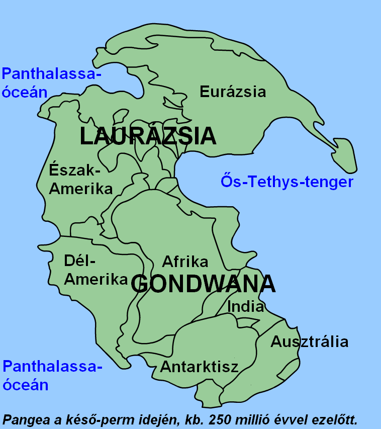 Pangaea